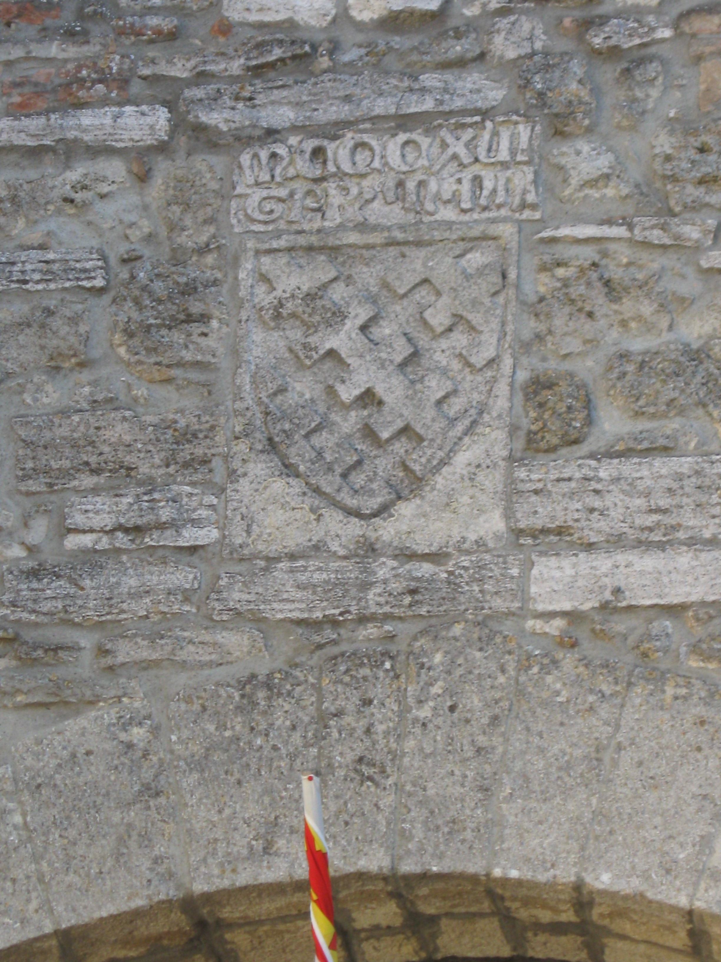 Stemma di porta Monalda sita in Sarteano (Siena).